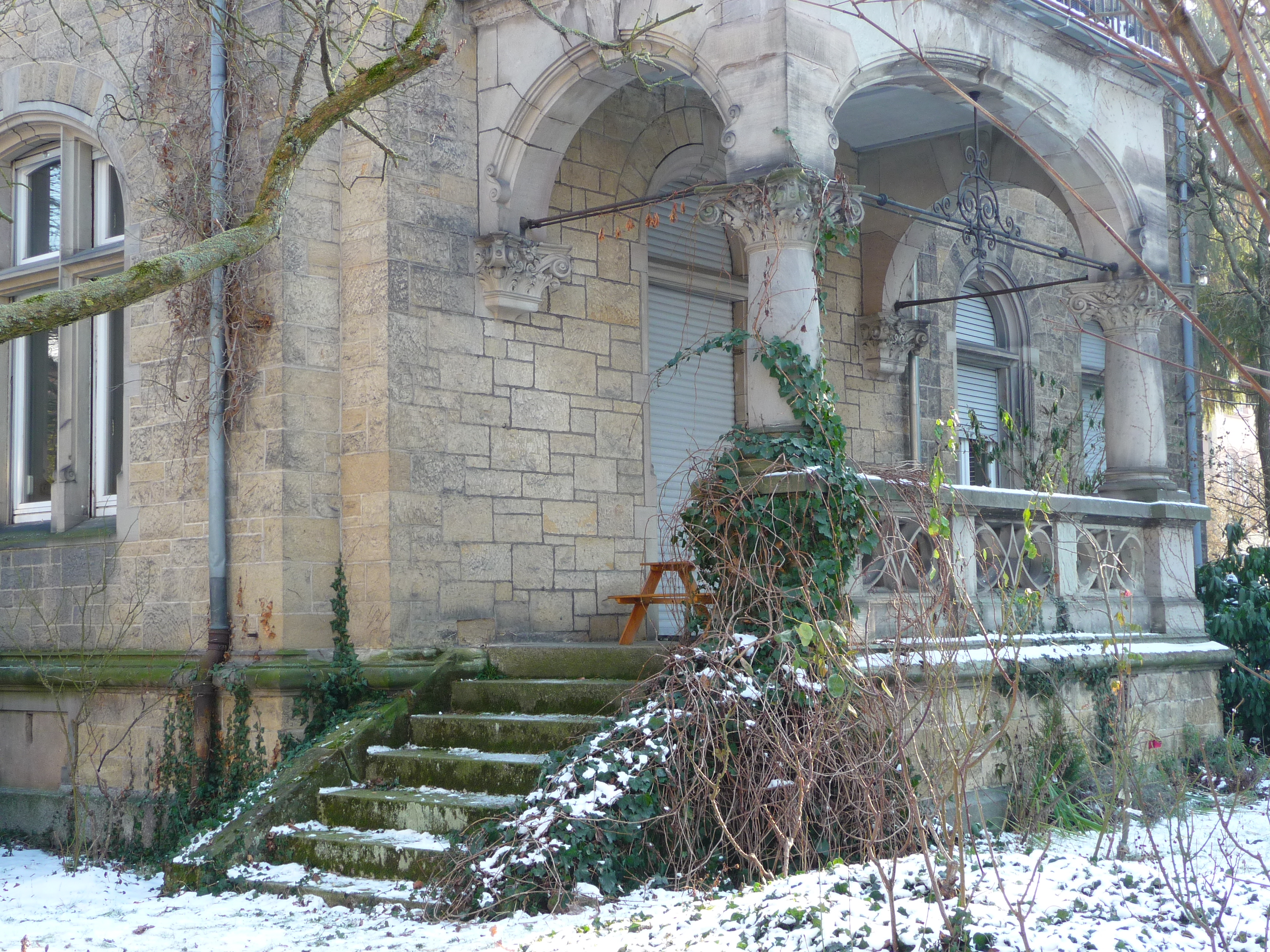 Loggia in Heidelberg (Weststadt)